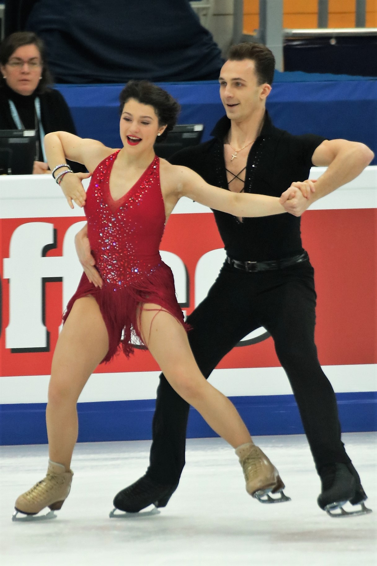 Наталья Калишек / Максим Сподырев (Польша) на Чемпионате Европы по фигурному катанию 2018.